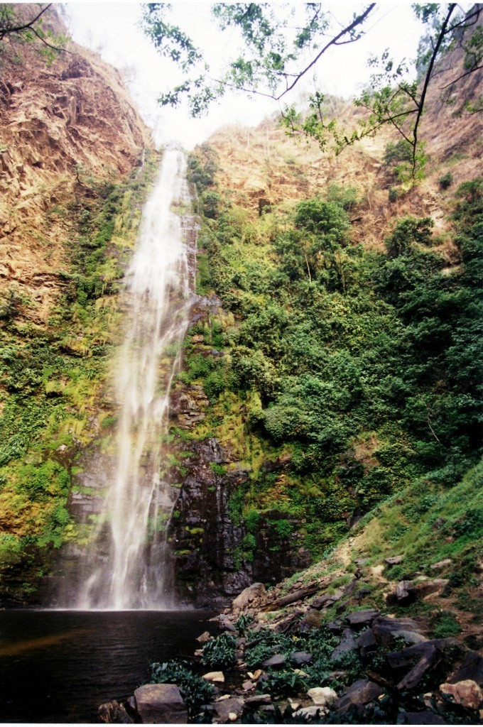 Wli-Falls in der Nähe von Hohoe an der Grenze zu Togo; fotografiert von Joerg Scherbaum (2002).